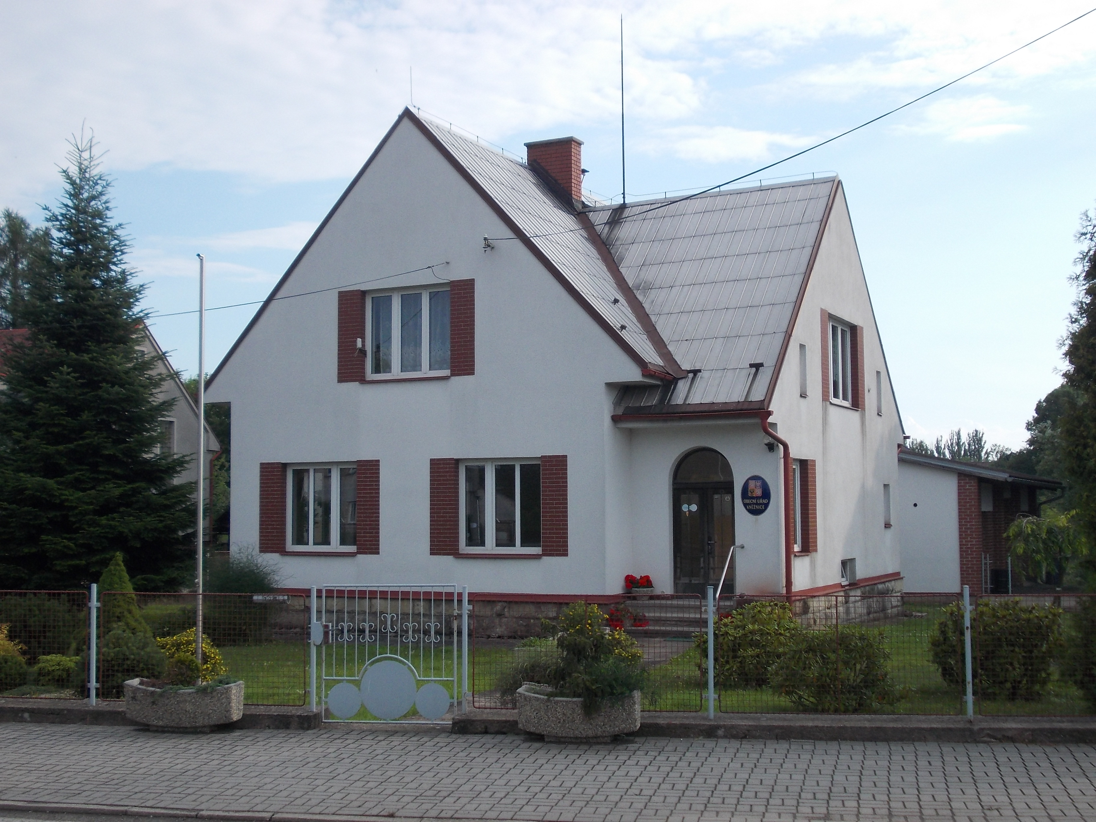 Kněžnice - obecní úřad (č.p. 123)